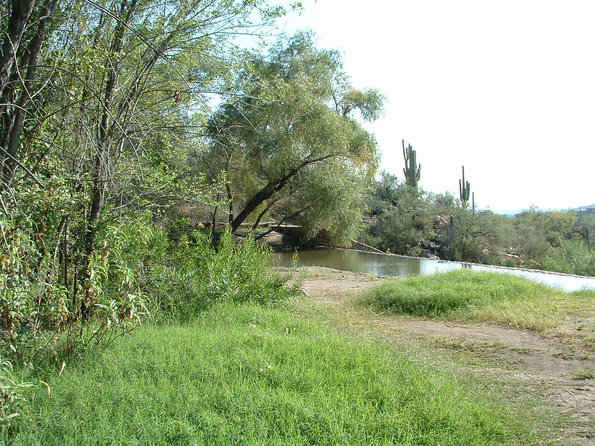 Sabino dam -- Desert Oasis